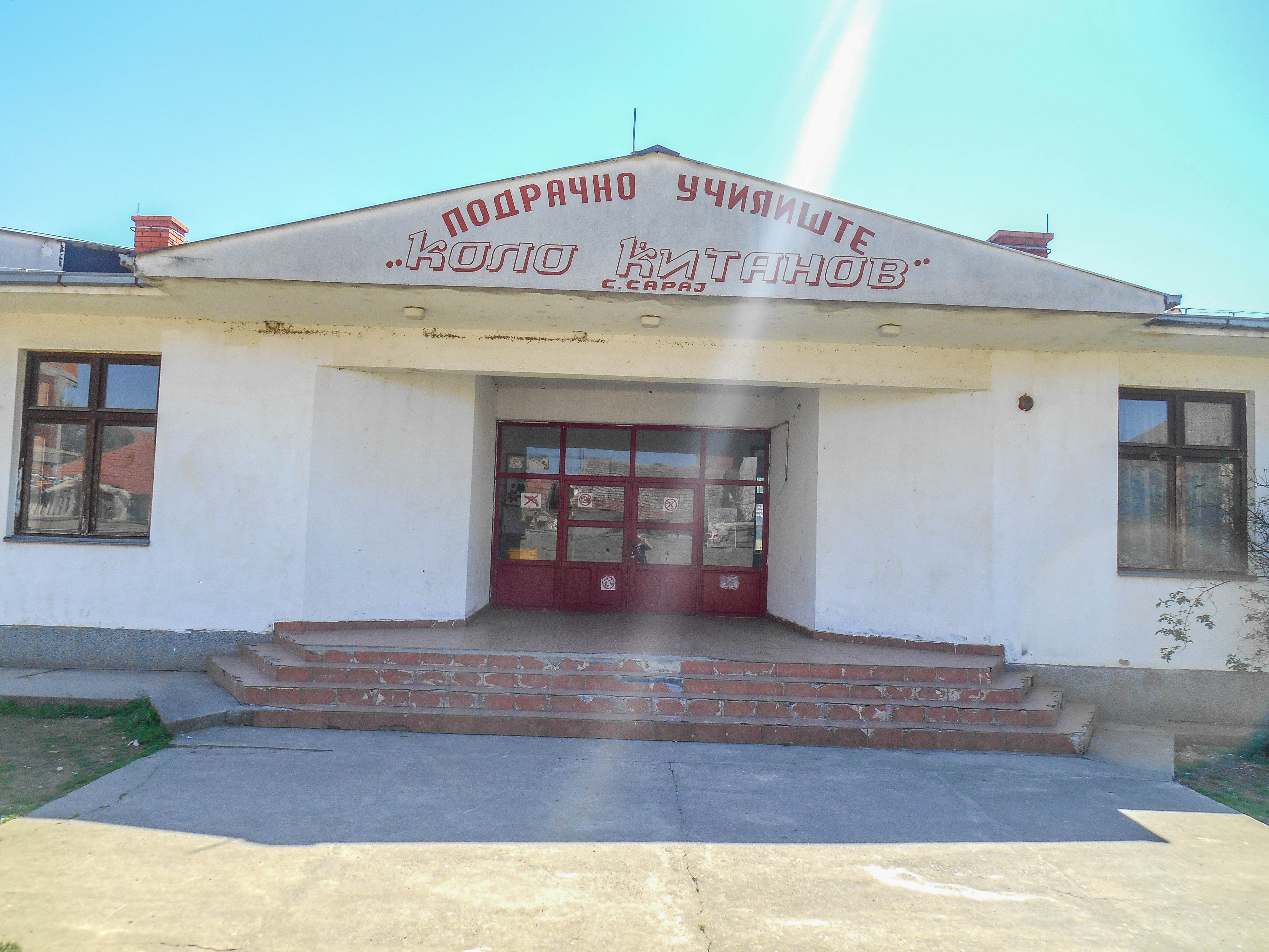 Основно училиште „Кољо Китанов“ - Сарај